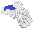 Portè a l'Alta Cerdanya. Mapa extret d'un altre mapa de lliure disposició.